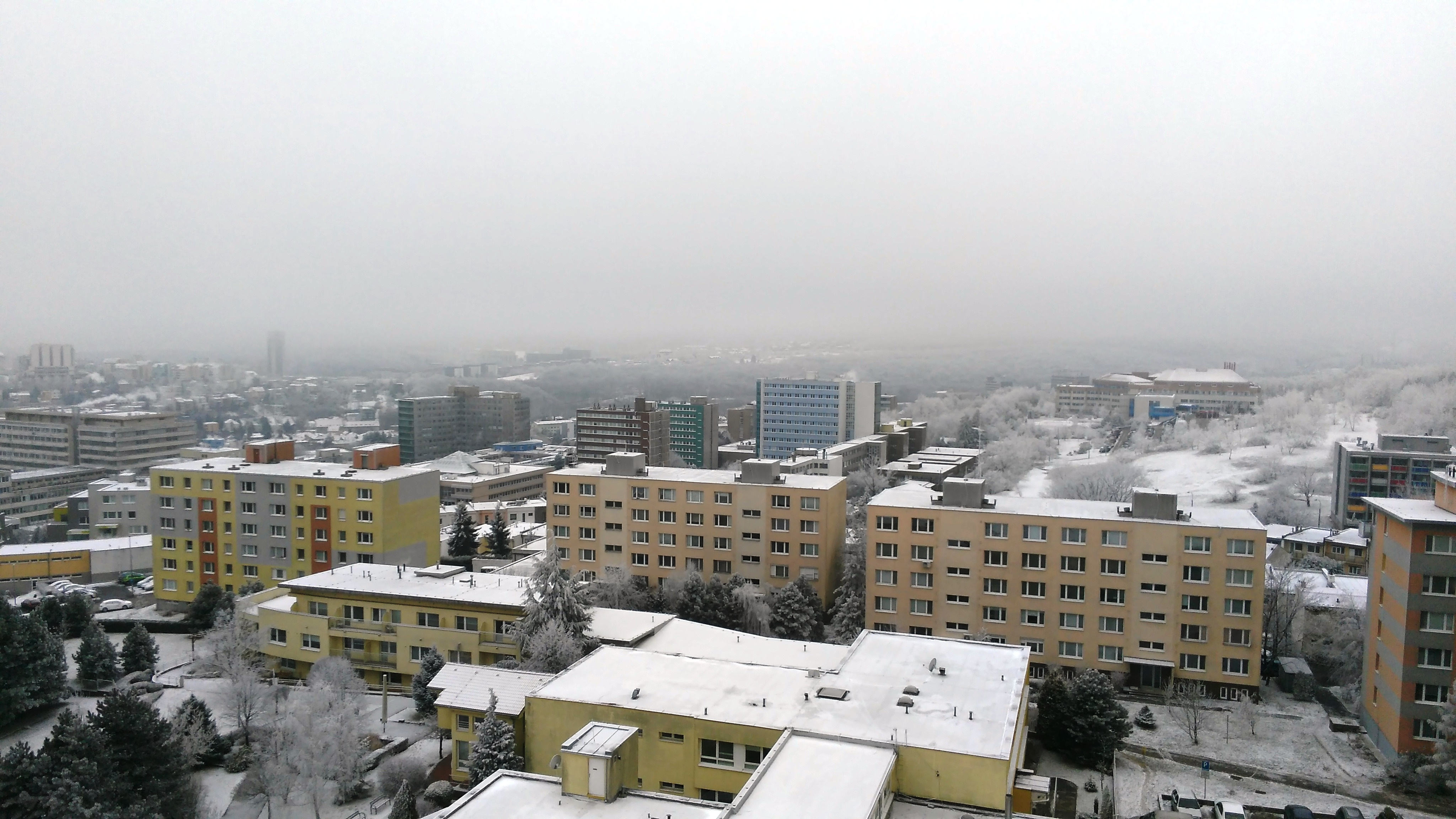 Bratislavská časť Kramáre